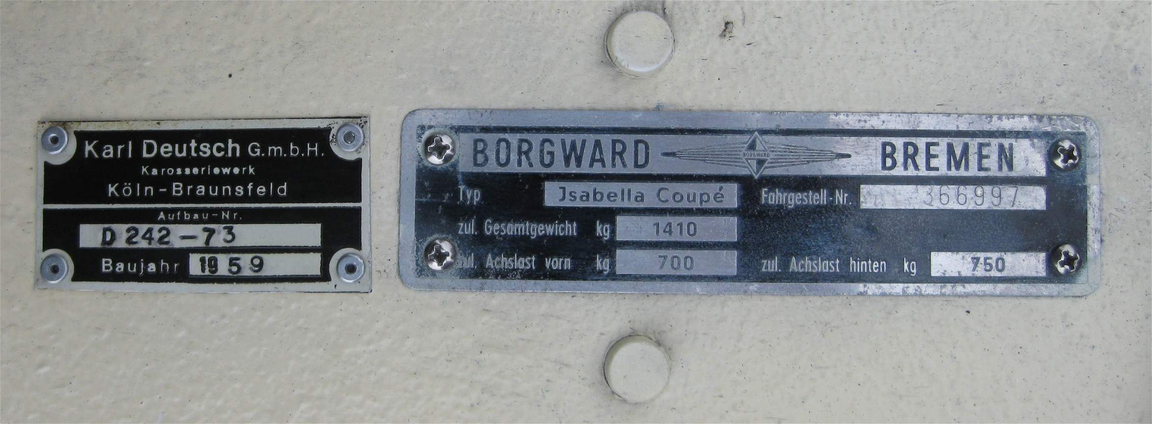 Typenschild Borgward Isabella Coupe Cabrio